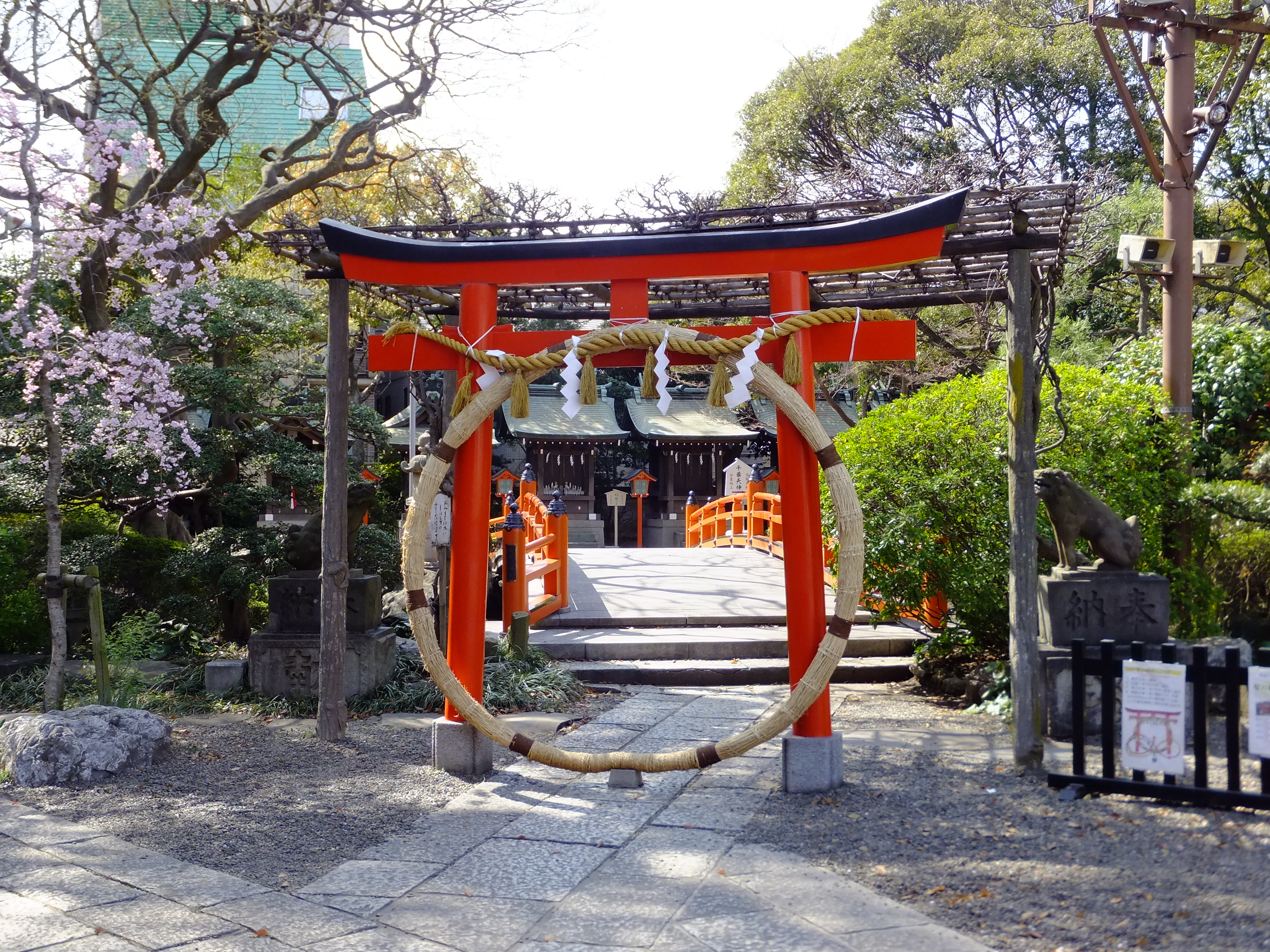 千葉神社智の輪